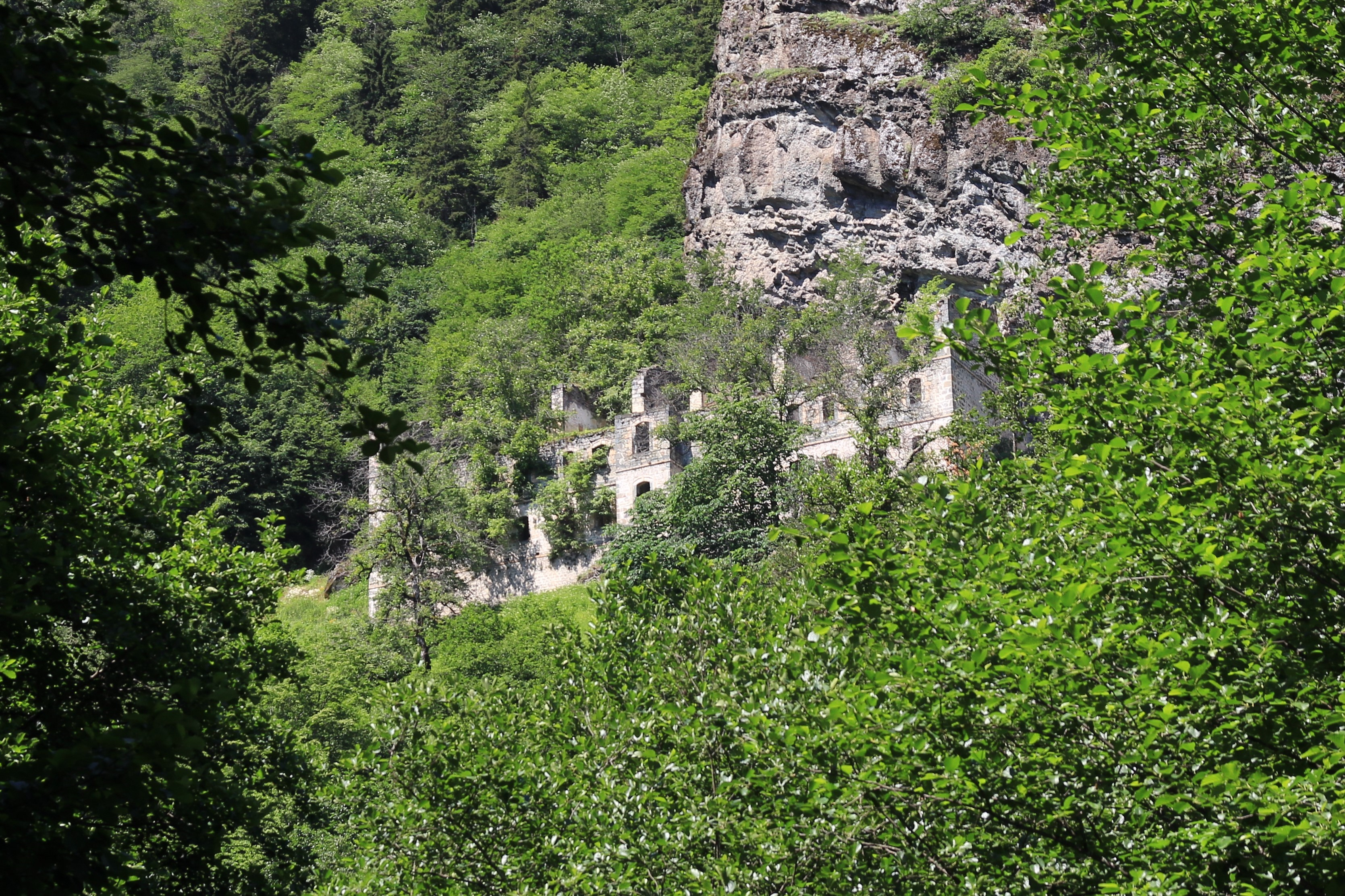 Kloster Vazelon, Hauptgebaeude im Juli 2014